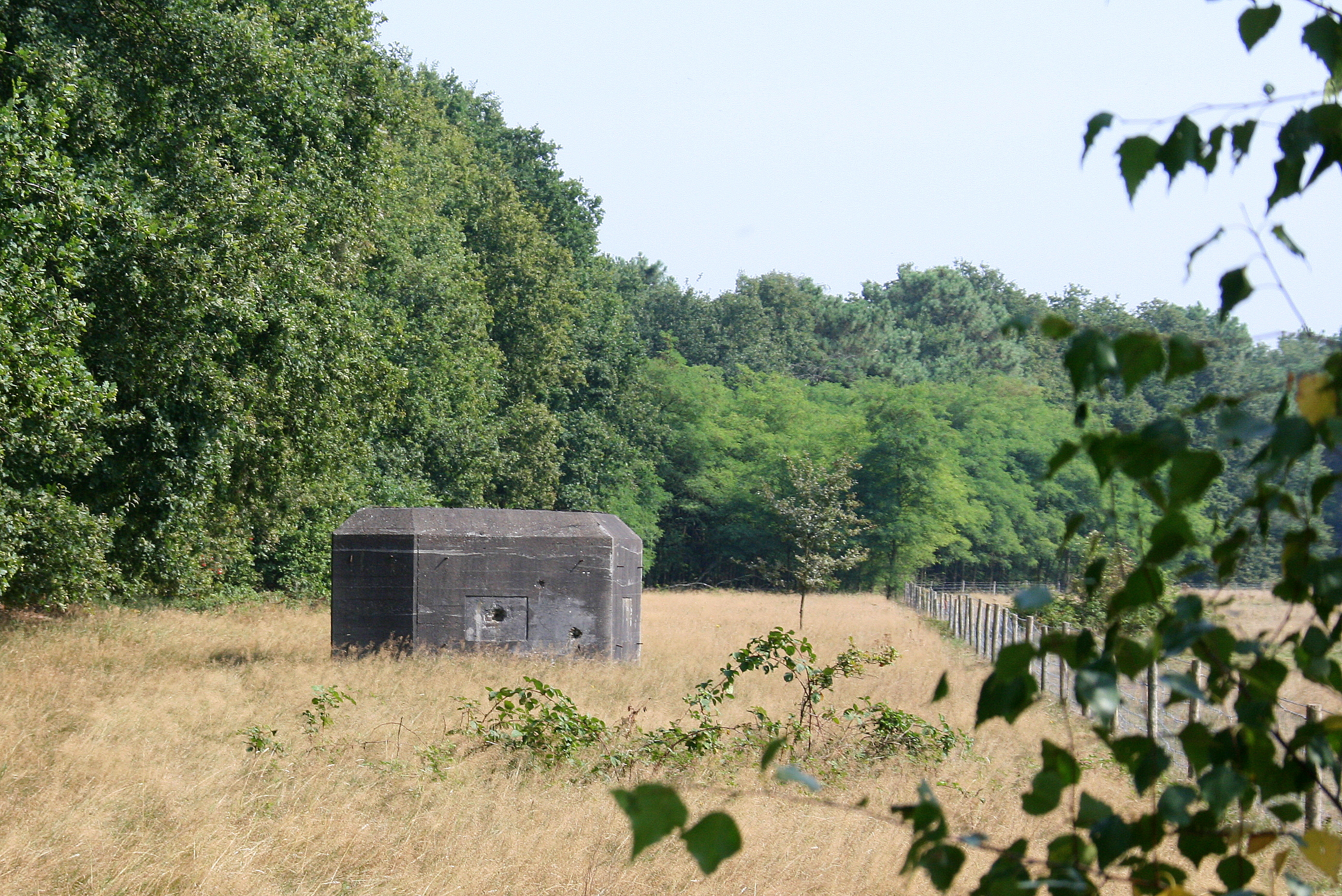 De vesting werd in 1933 en 1939 door het Nederlandse leger aangelegd als onderdeel van de Peel-Raamstelling om de verwachte Duitse opmars te stoppen. De vesting telde zeven zware bunkers, loopgraven, gevechtsputten en andere versperringen. Ze bleef in 1940 ongebruikt liggen. In 1944 maakten afwisselend Duitse en Geallieerden gebruik van dit fort waarvan nog vijf bunkers in wei en bos liggen.